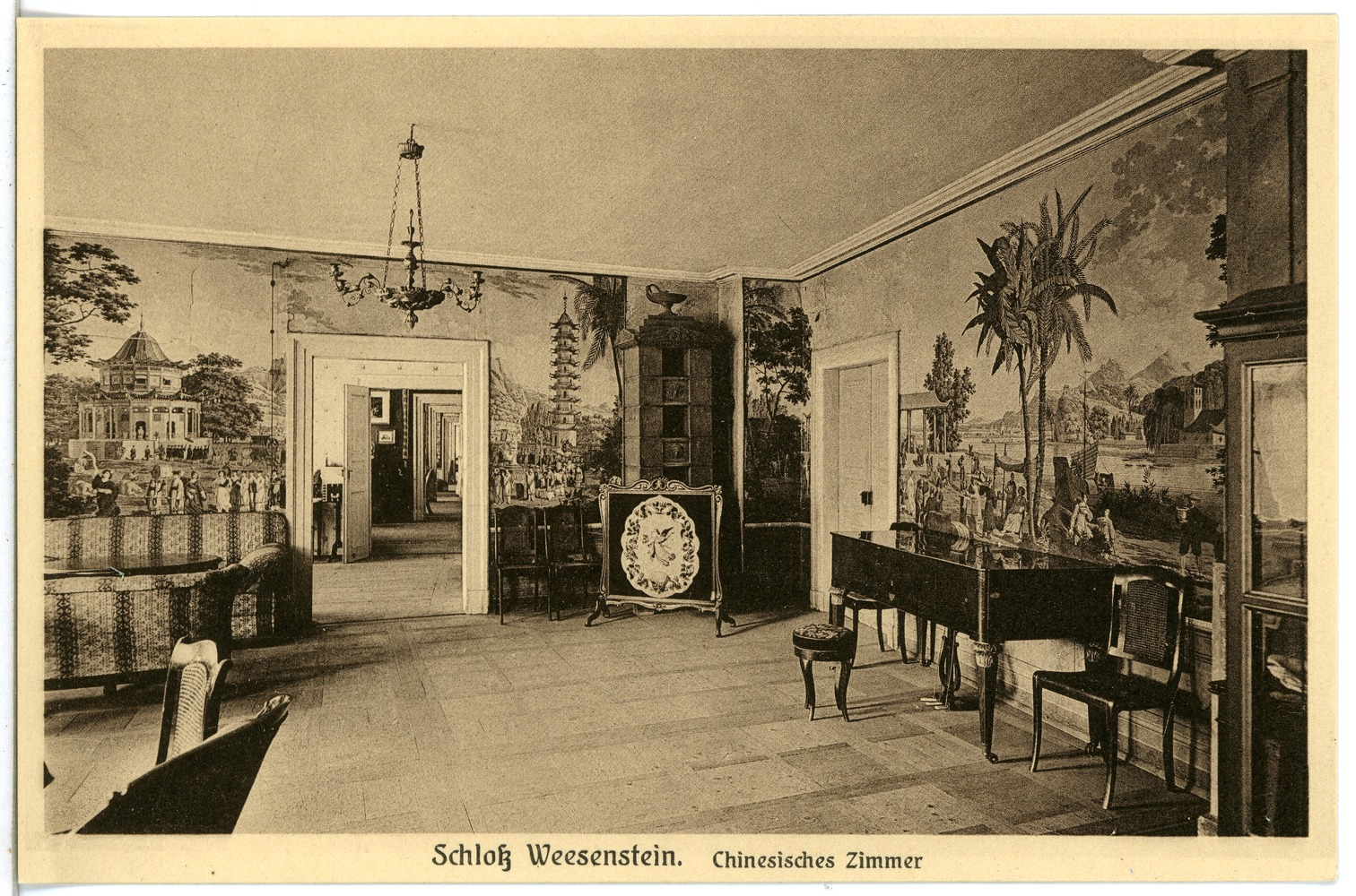 Weesenstein; Schloß - Chinesisches Zimmer This postcard is from publisher Brück & Sohn in Meißen ( postcard has a unique number 23891 and is available in a higher resolution at the publisher. This images was uploaded in a cooperation project between Wikipedians and the publisher.